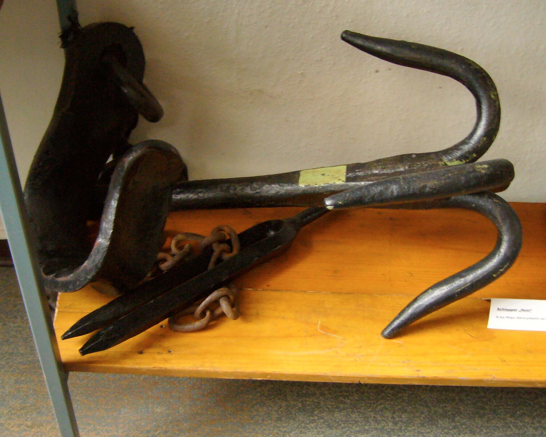 Briddelhaken